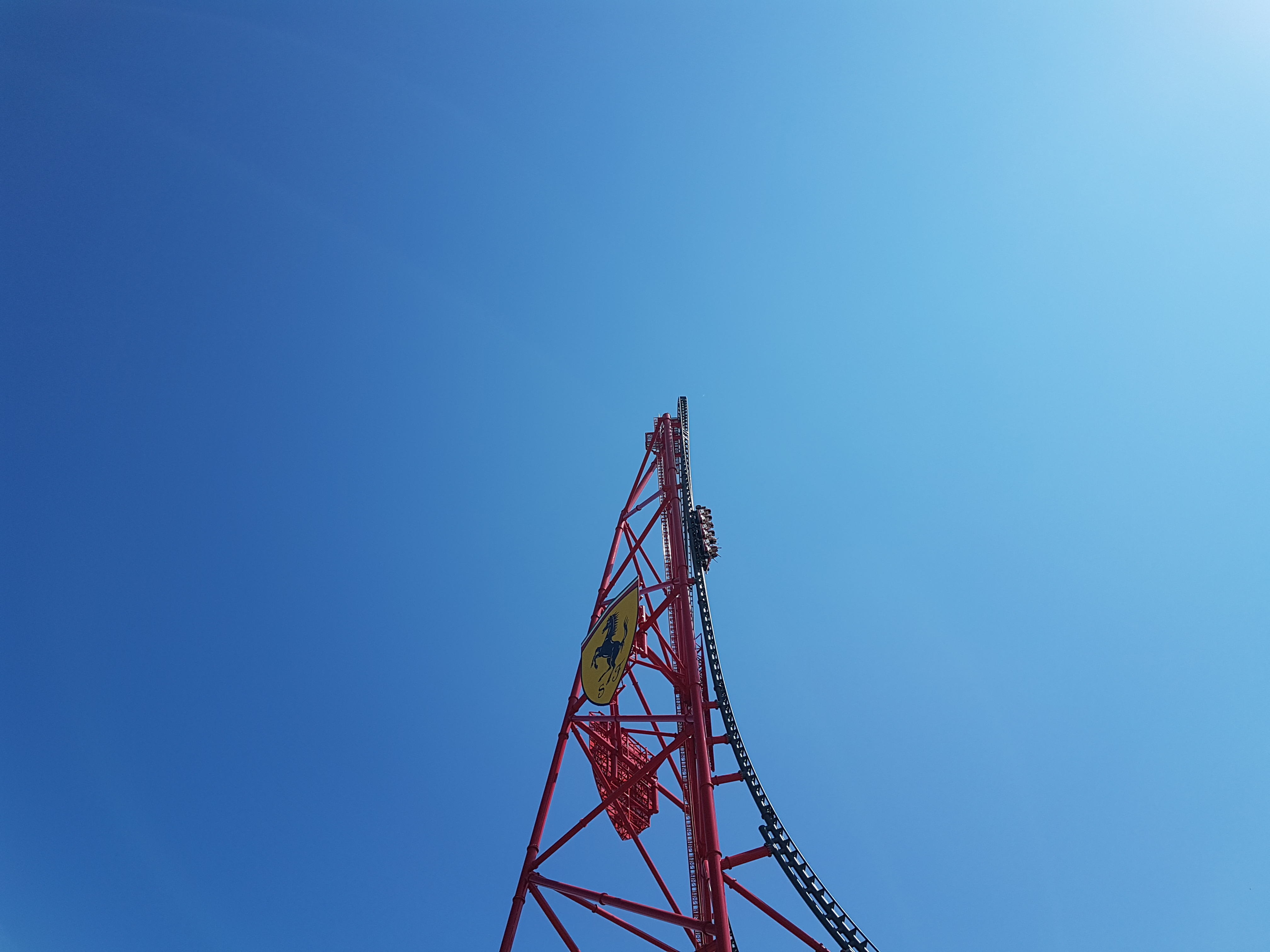 Dies ist Red Force die schnellste und höchste Achterbahn in Europa.